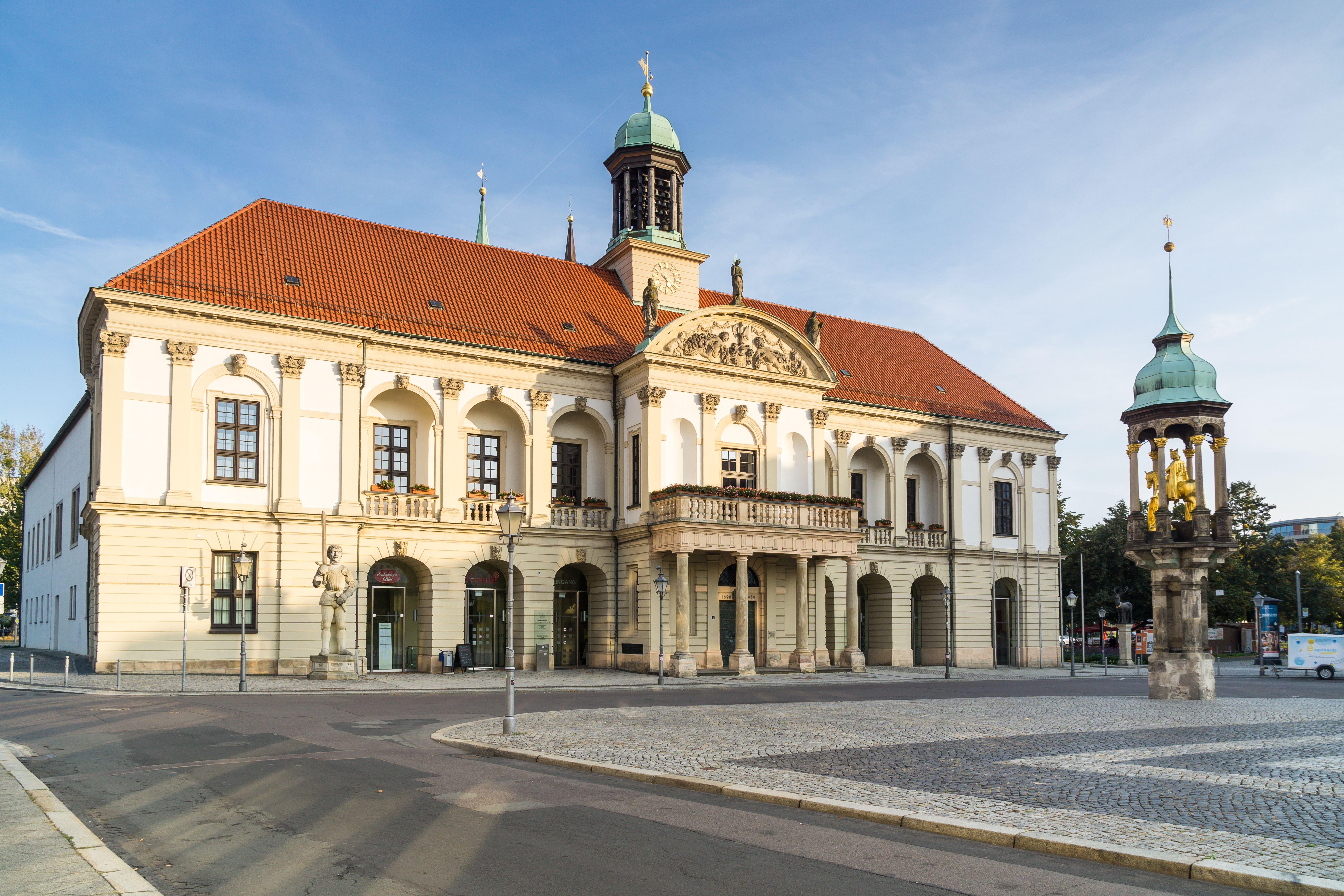 Altes Rathaus und Magdeburger Reiter, Alter Markt 6 in Magdeburg Stt Magdeburger Altstadt This is a picture of the Baudenkmal (cultural heritage monument) according to the Cultural Heritage Protection Law of Saxony-Anhalt with the ID 094 06326